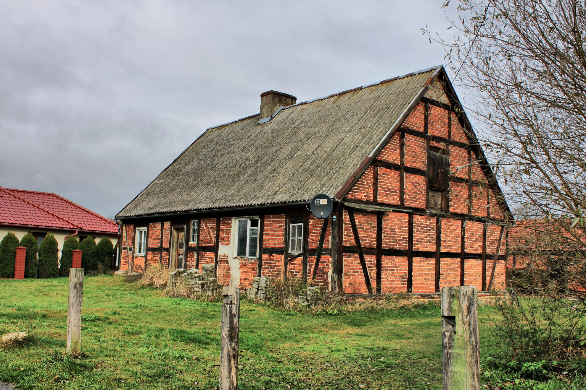 Dom o konstrukcji szachulcowej w Mironicach